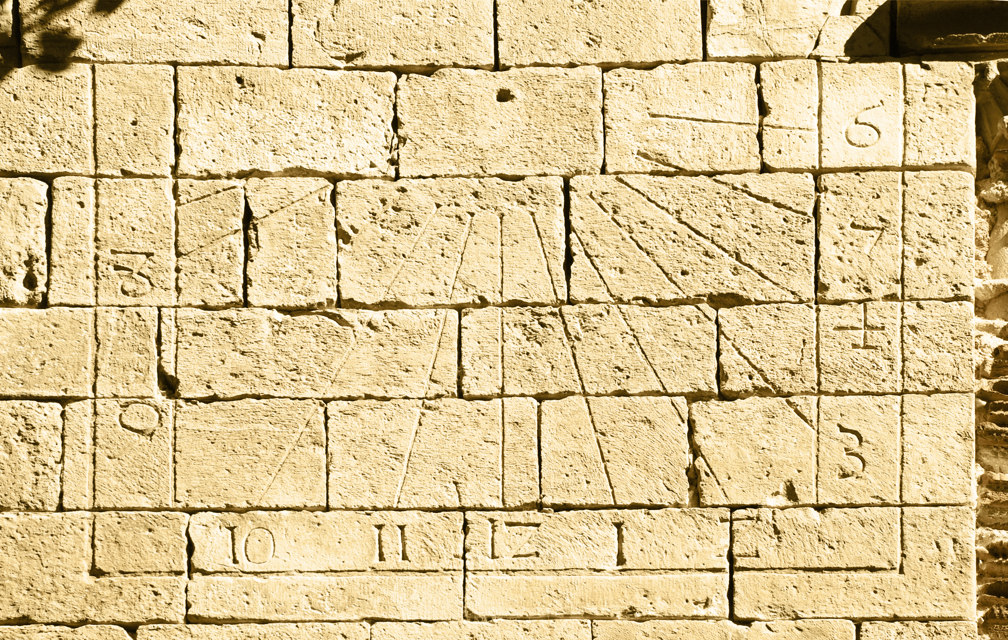 Reloj de sol sobre el Pórtico de la Fachada Sur de la Iglesia del Monasterio de Bonaval, Retiendas (Guadalajara) España, gótico cisterciense, s. XII.